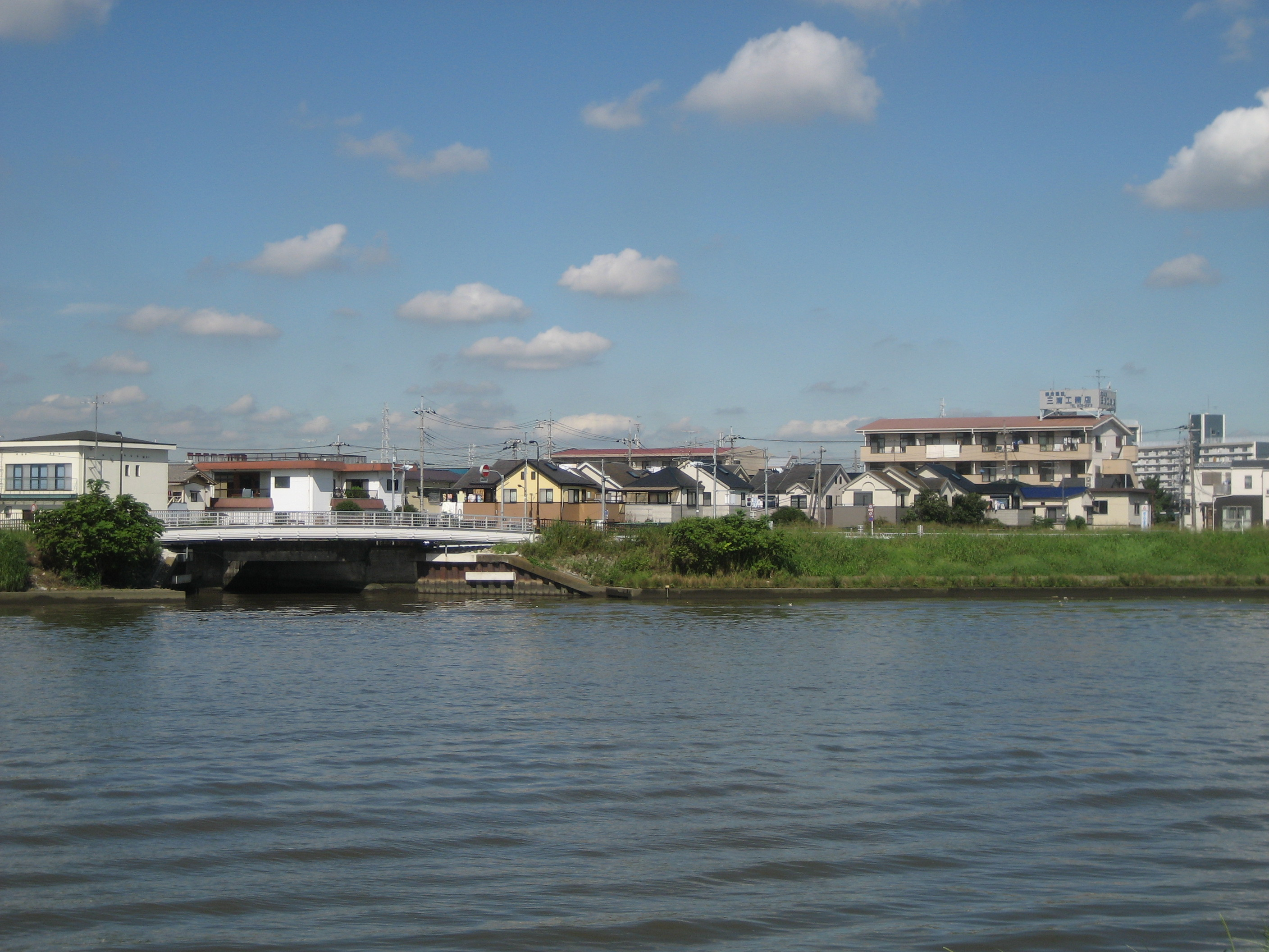 足立区六木地区（葛飾区側から撮影）